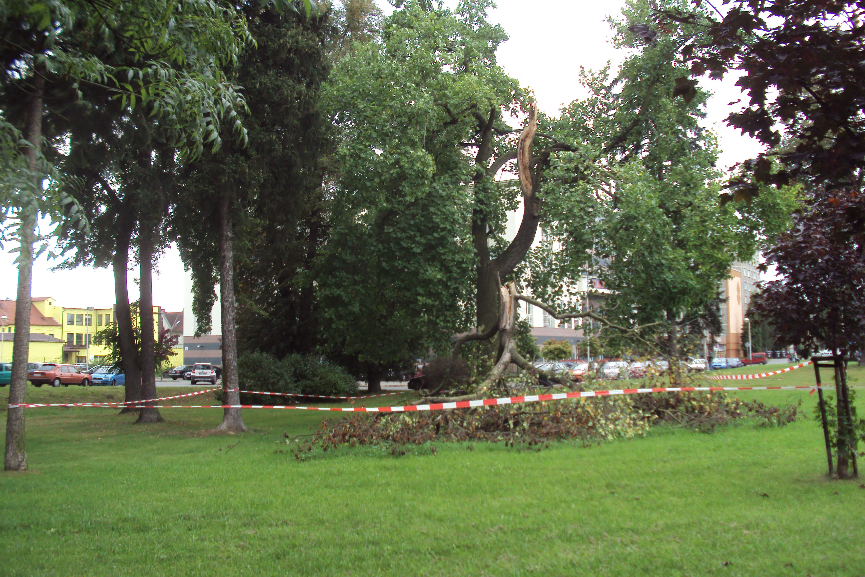 Česky: Chráněný liliovník u Kauflandu po bouřce ztratil část koruny